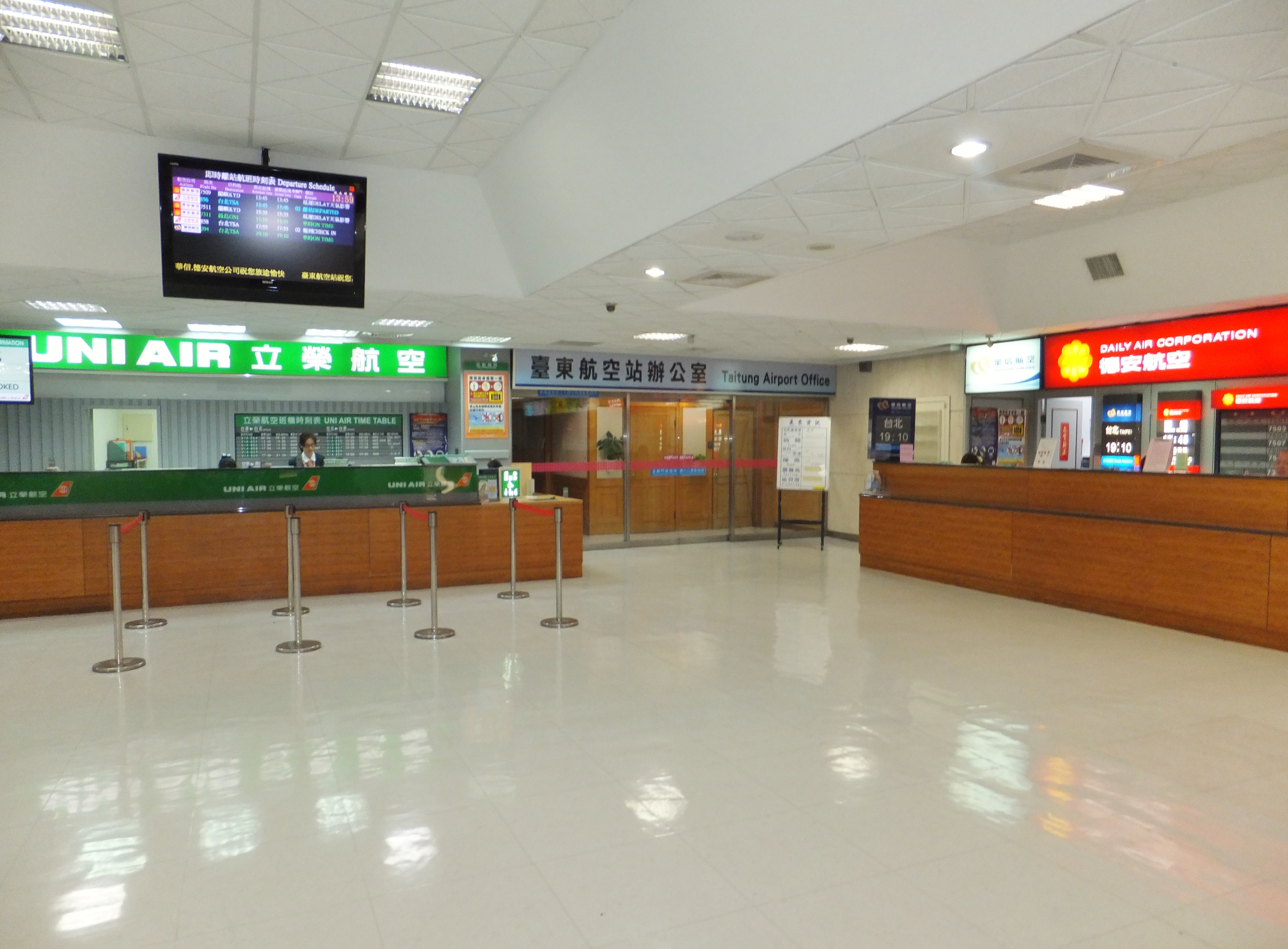 臺東機場航站大樓東北的立榮、德安航空報到櫃檯與機場辦公室。